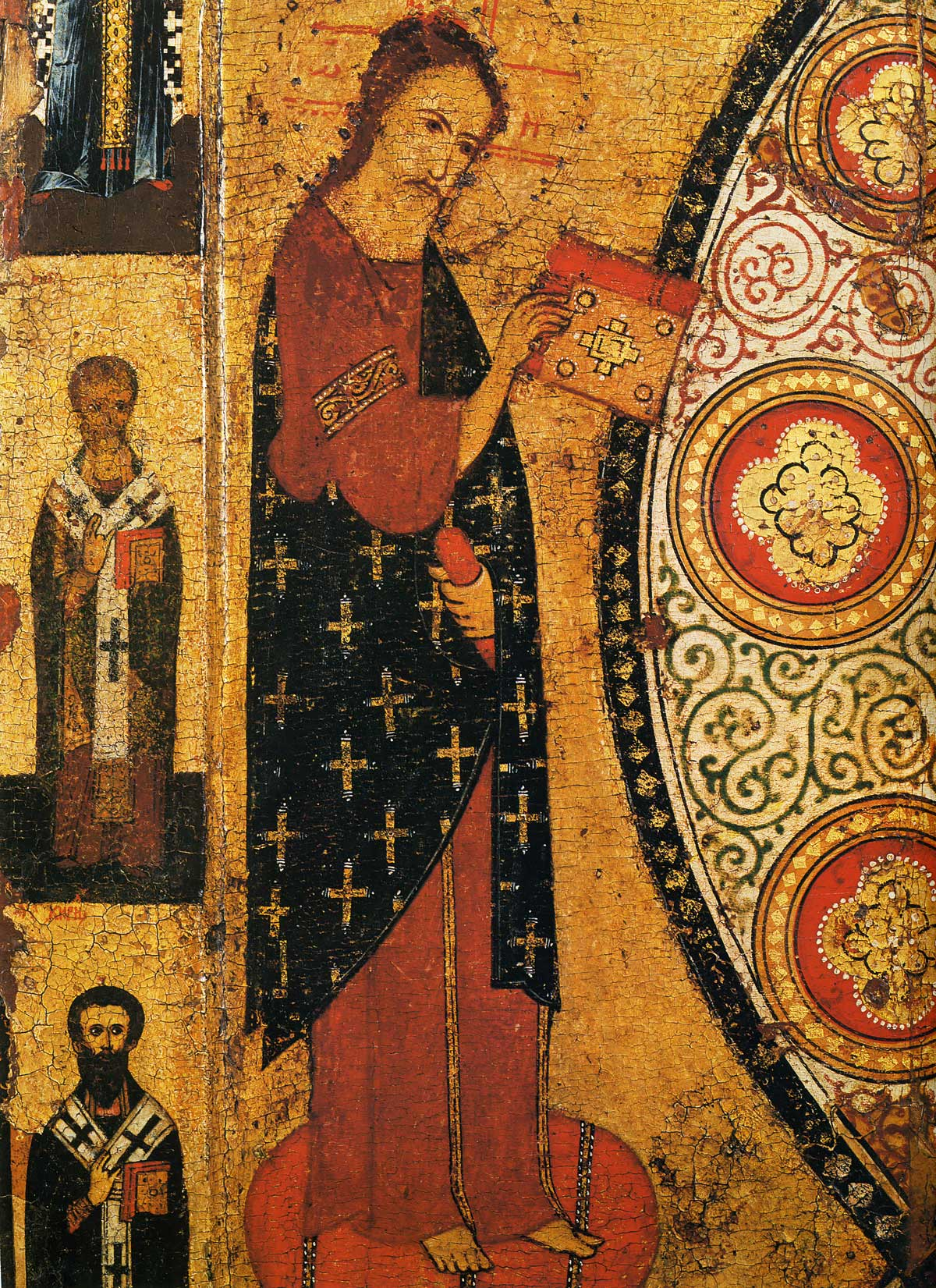 Иисус Христос. Деталь иконы «Никола Липенский»